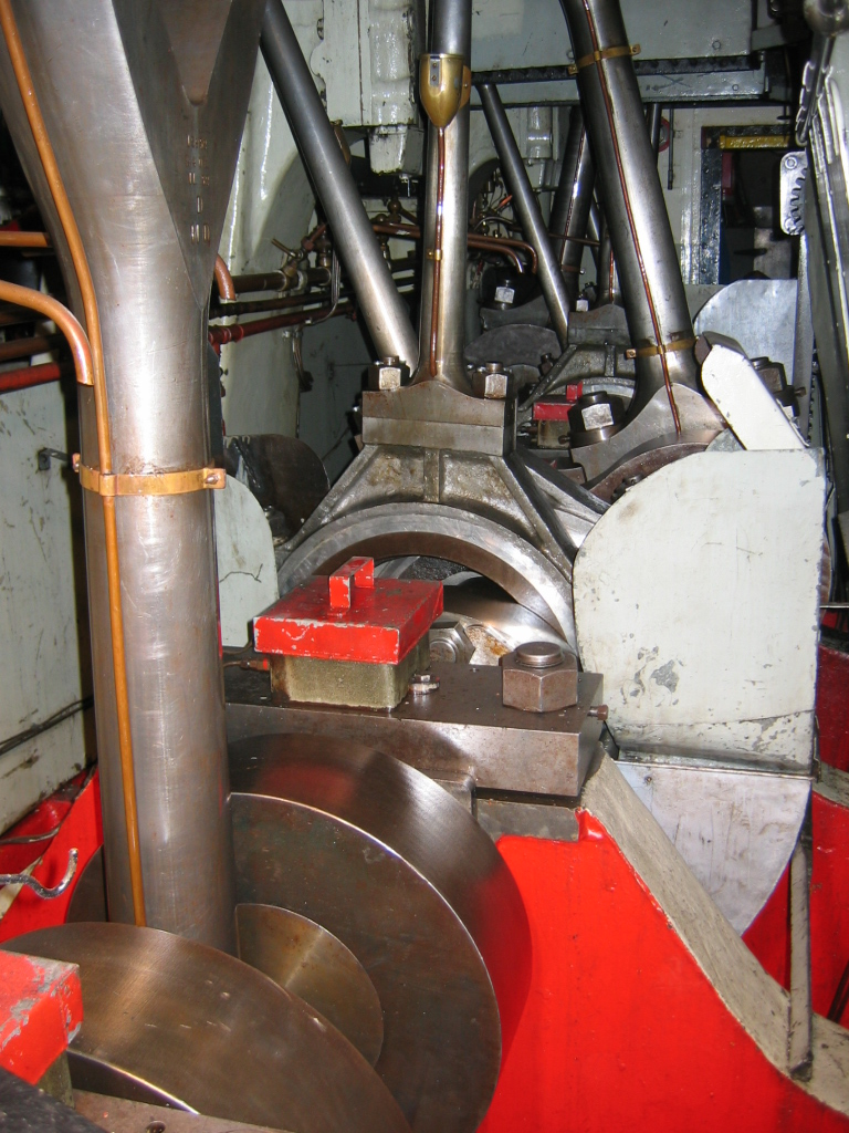 korbowód silnika, parowiec Stettin